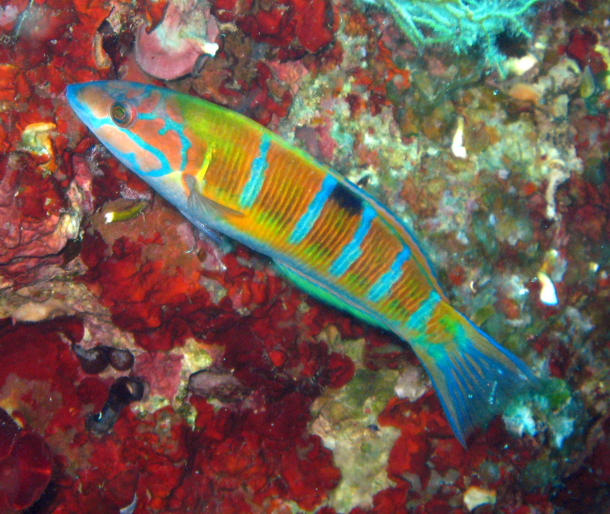 Female Thalassoma pavo taken in Bali (Crete)